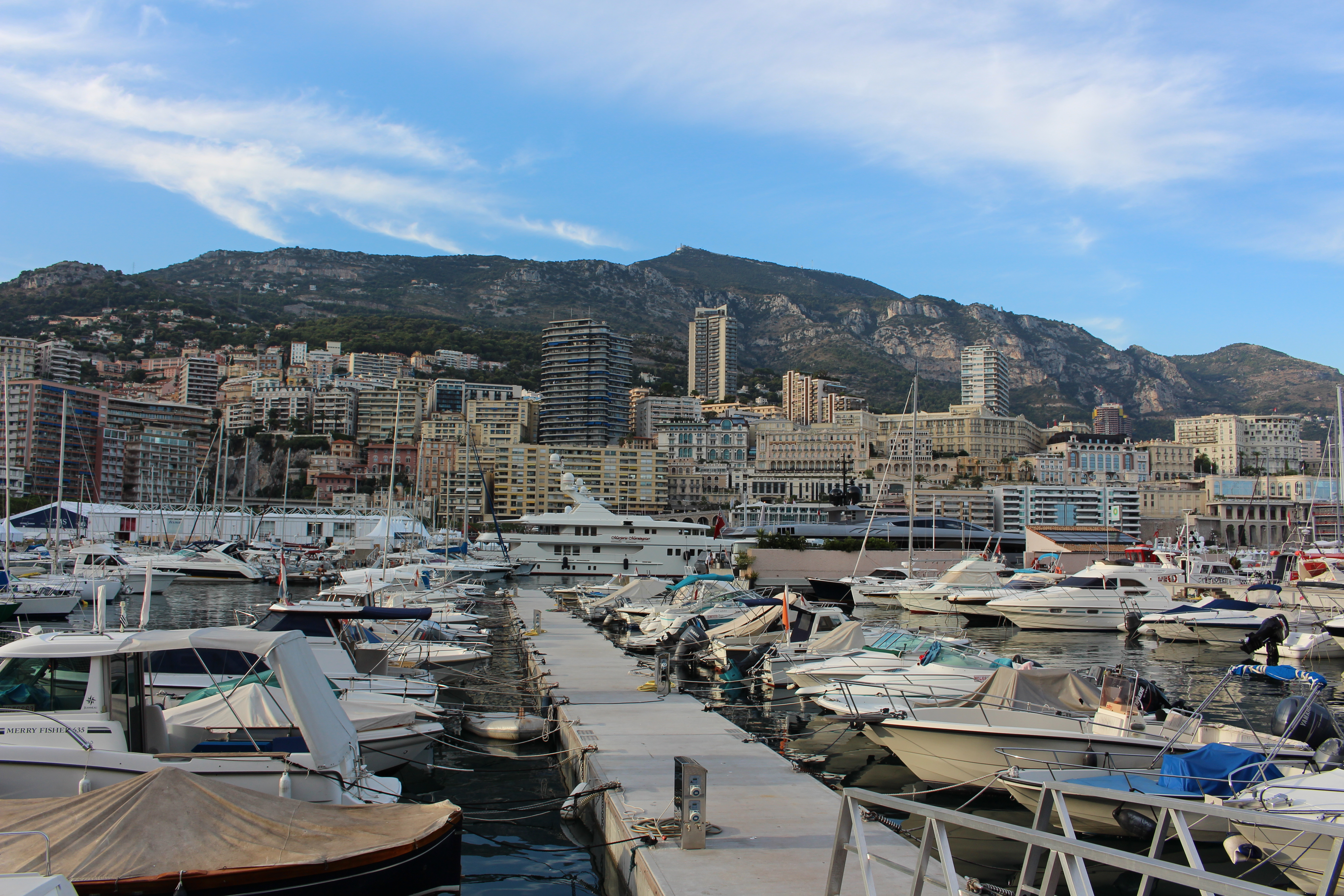 Ла-Кондамин. Монако. В порту.